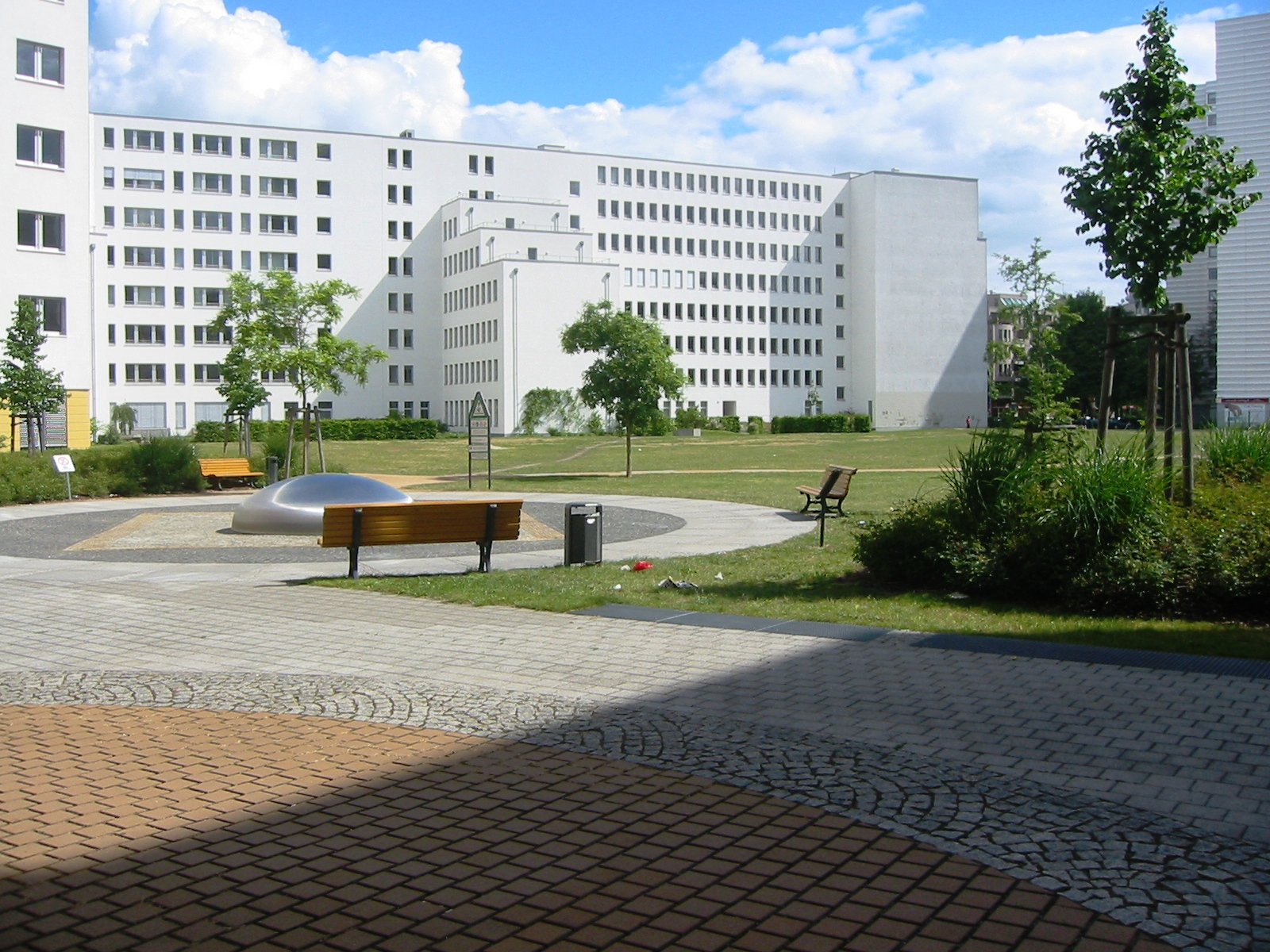 Markgrafenpark in Berlin-Kreuzberg (Blick von der Rudi-Dutschke-Straße in Richtung Lindenstraße)